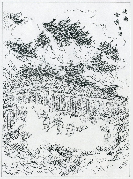 梅ケ島金山の図。『駿河志料』所収。